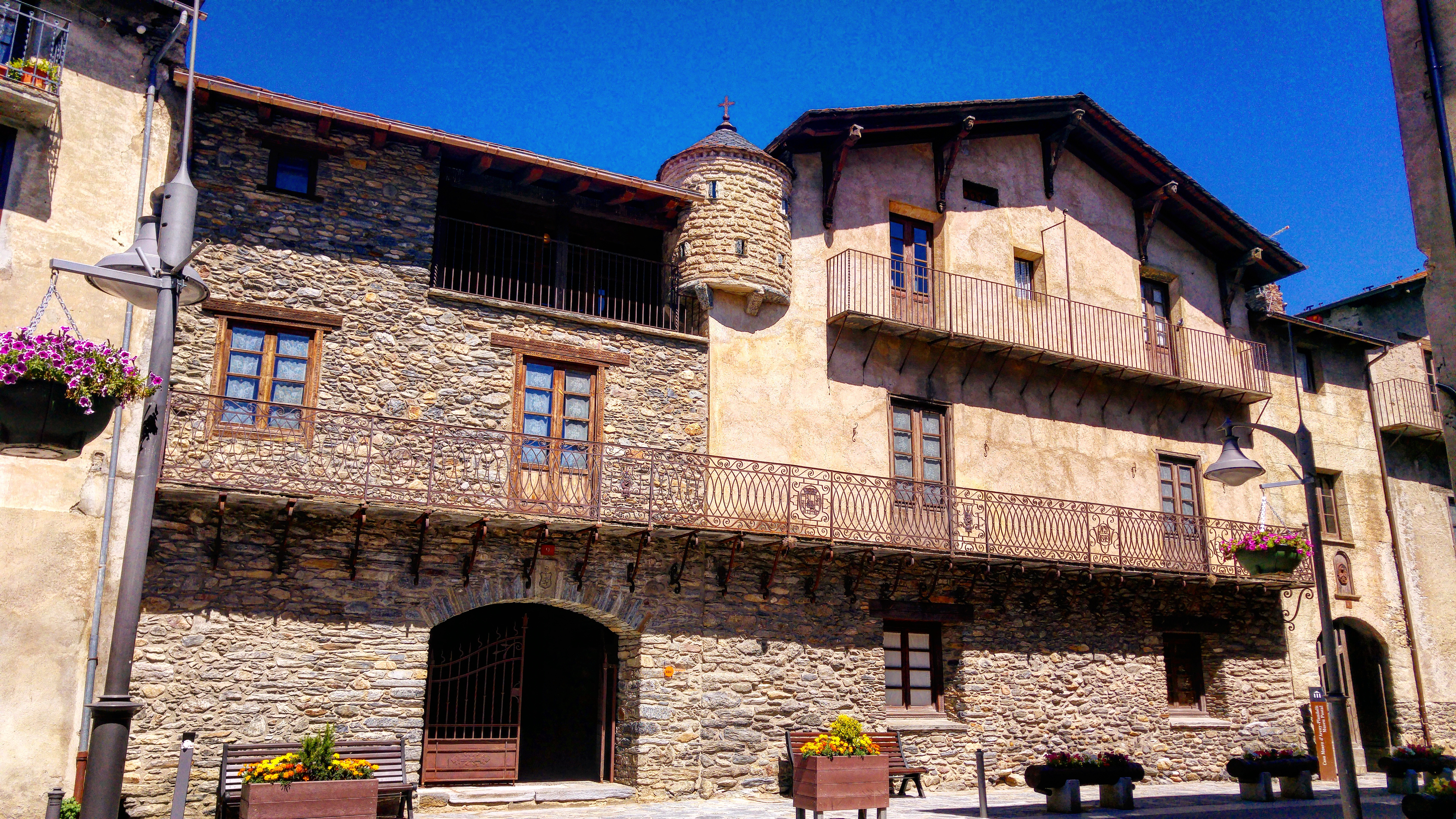 Casa de la família Areny-Plandolit al carrer Major d'Ordino, Principat d'Andorra